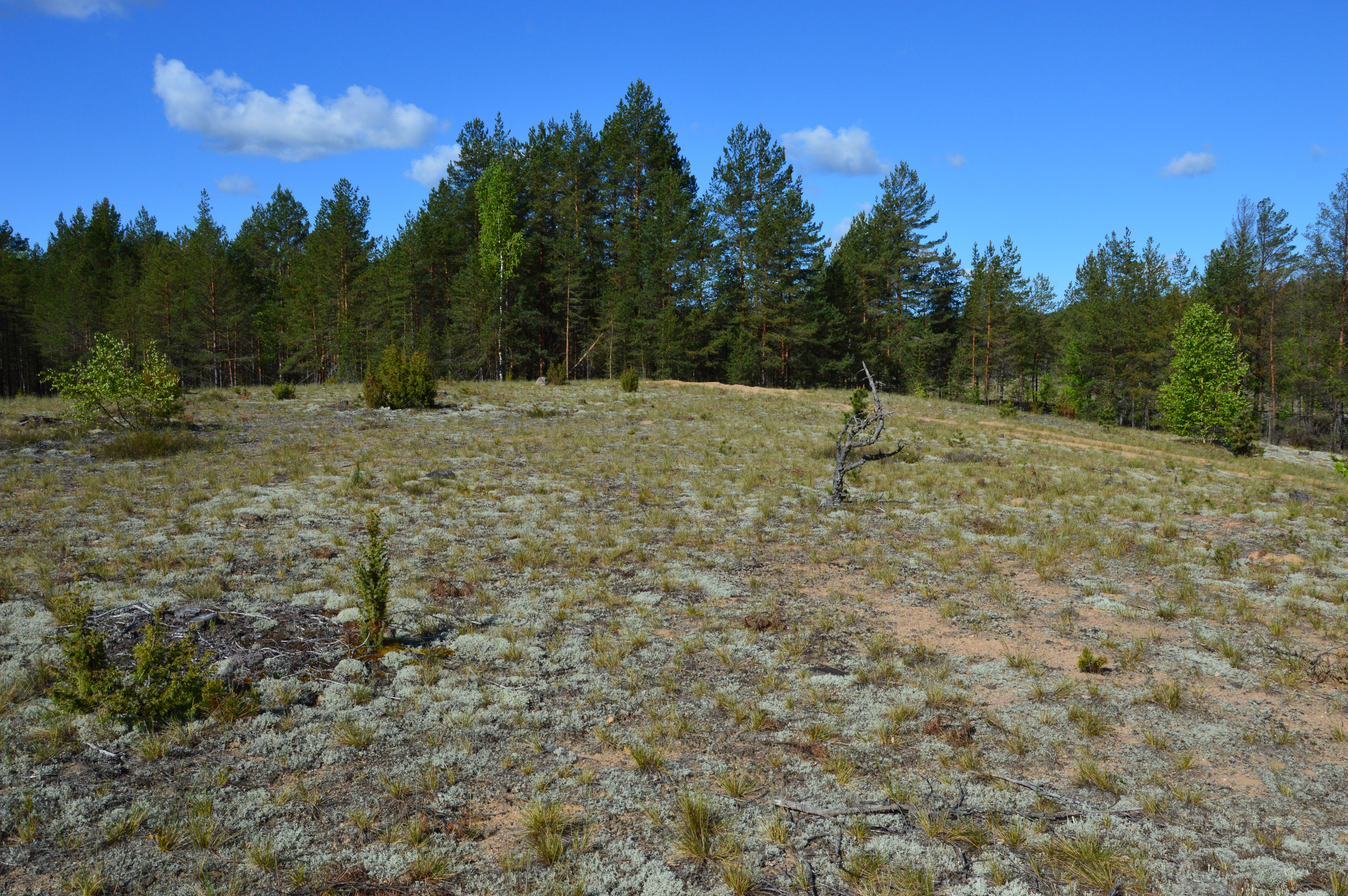 Mustoja MKA, Tinaliiv. Nimetatud ka Setumaa Sahaaraks.